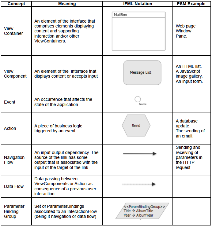 Tabella contenente i concetti principali dell'Interaction Flow Modeling Language